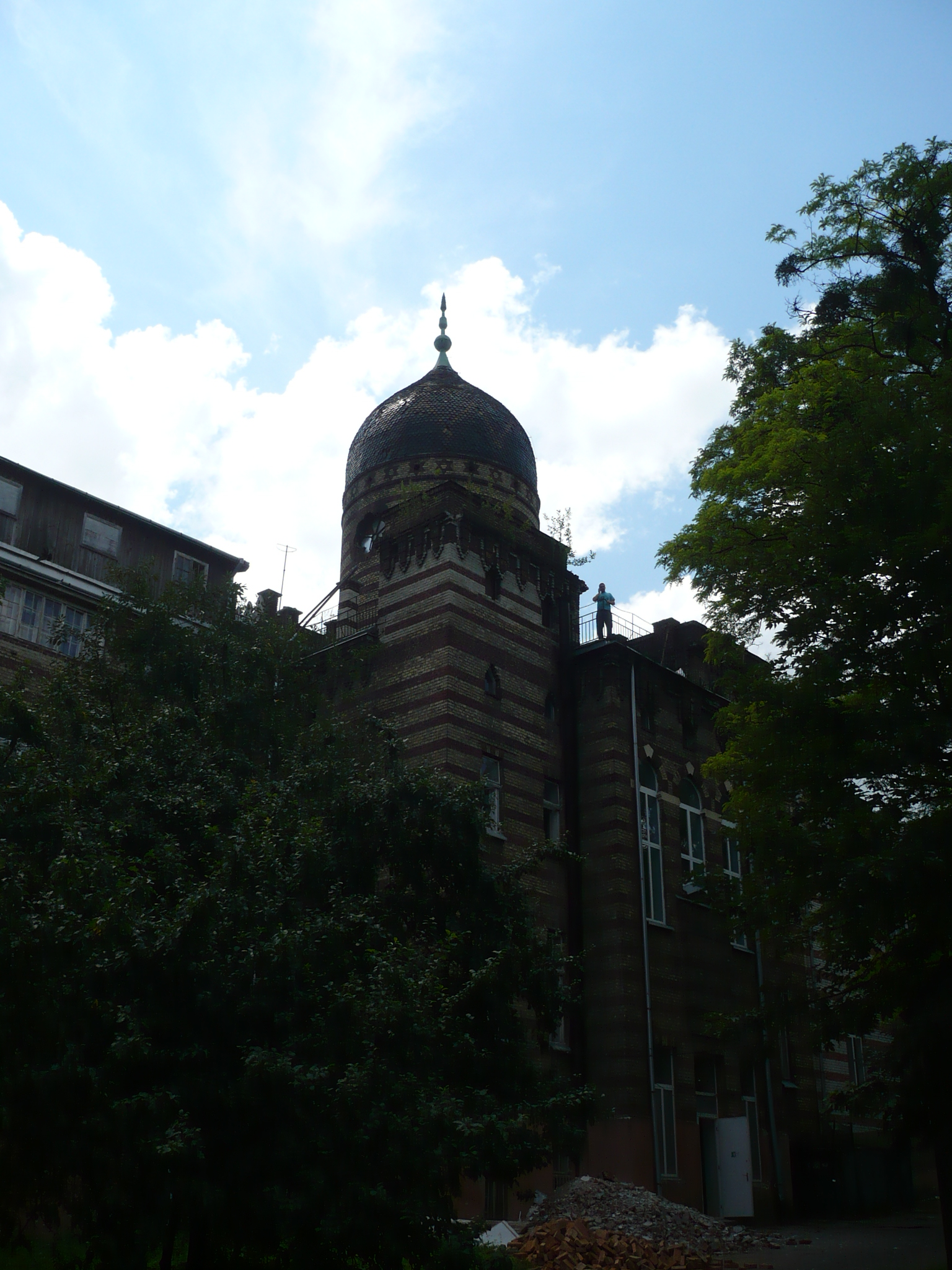 Lwów, ul. Jakuba Rappaporta 8 - Szpital żydowski im. M. Lazarusa, 1898-1901